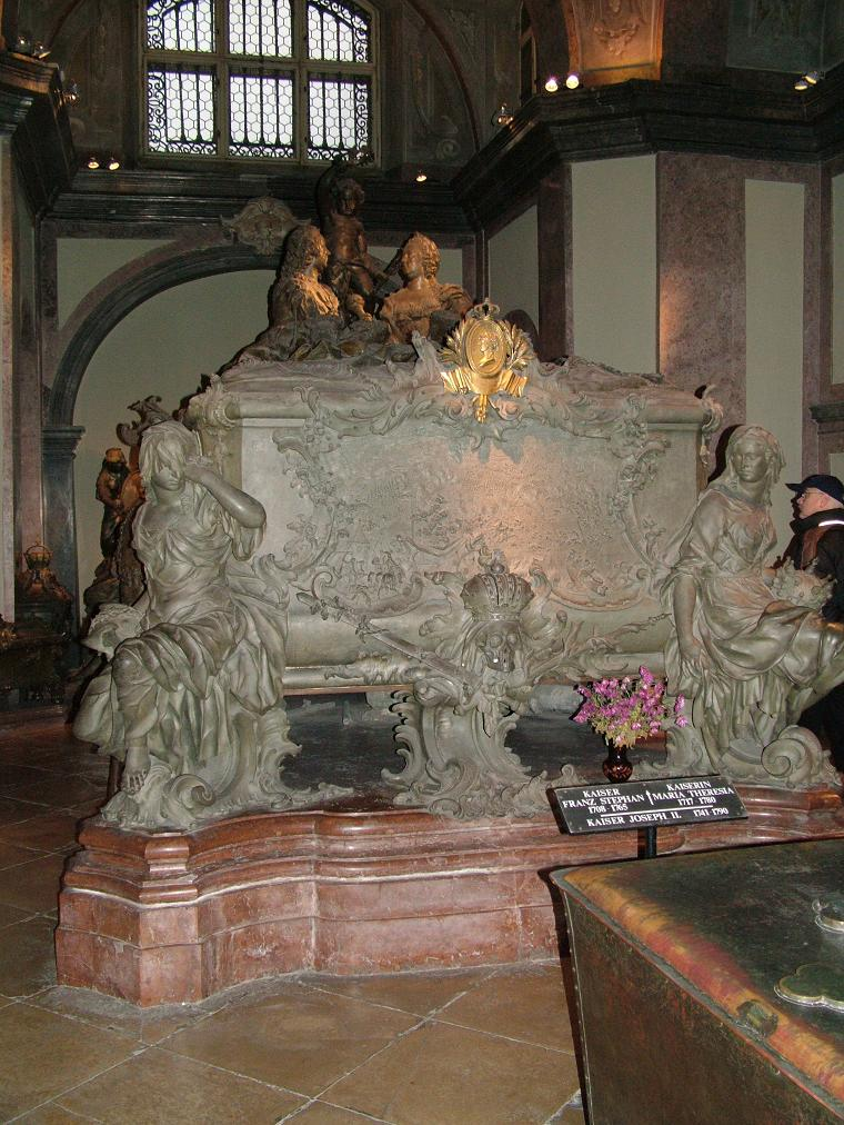 Grab Kaiserin Maria Theresia